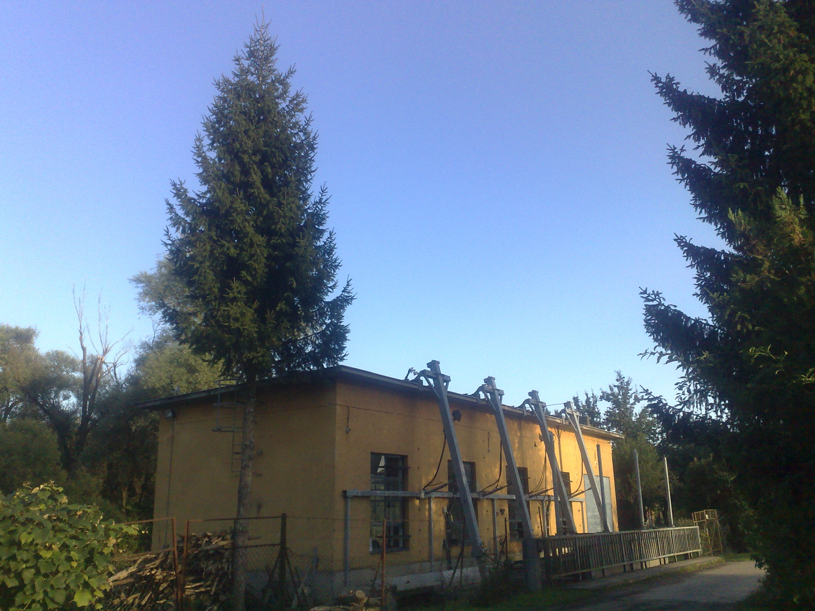 Az alsószölnöki vízerőmű épülete